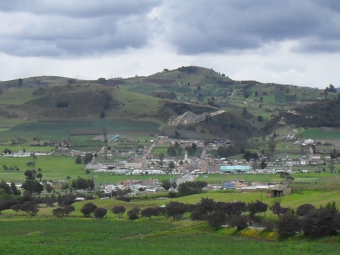 Panorámica por el costado occidental del municipio de Soraca, Boyaca, Colombia